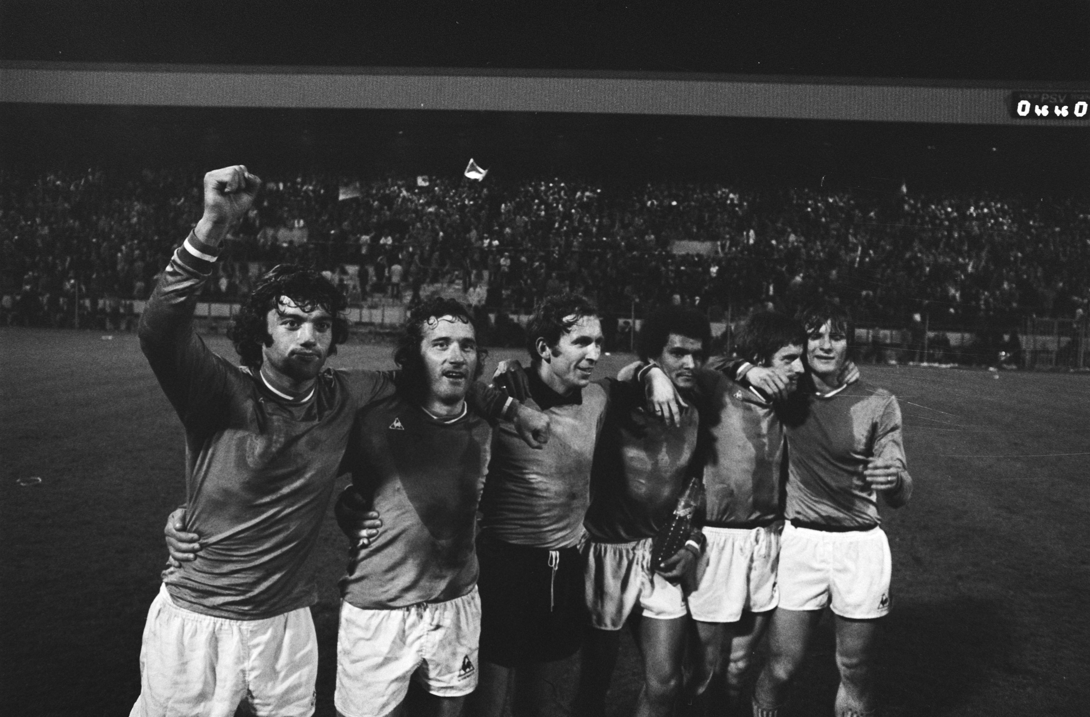 Collectie / Archief : Fotocollectie Anefo Reportage / Serie : [ onbekend ] Beschrijving : PSV tegen St. Etienne halve finale Europa Cup I, Speler St Etienne vieren feest na behalen finale, Eindstand 0.0 Datum : 14 april 1976 Locatie : Eindhoven Trefwoorden : sport, voetbal, voetballers Instellingsnaam : Europa Cup Fotograaf : Verhoeff, Bert / Anefo Auteursrechthebbende : Nationaal Archief Materiaalsoort : Negatief (zwart/wit) Nummer archiefinventaris : bekijk toegang 2.24.01.05 Bestanddeelnummer : 928-5254